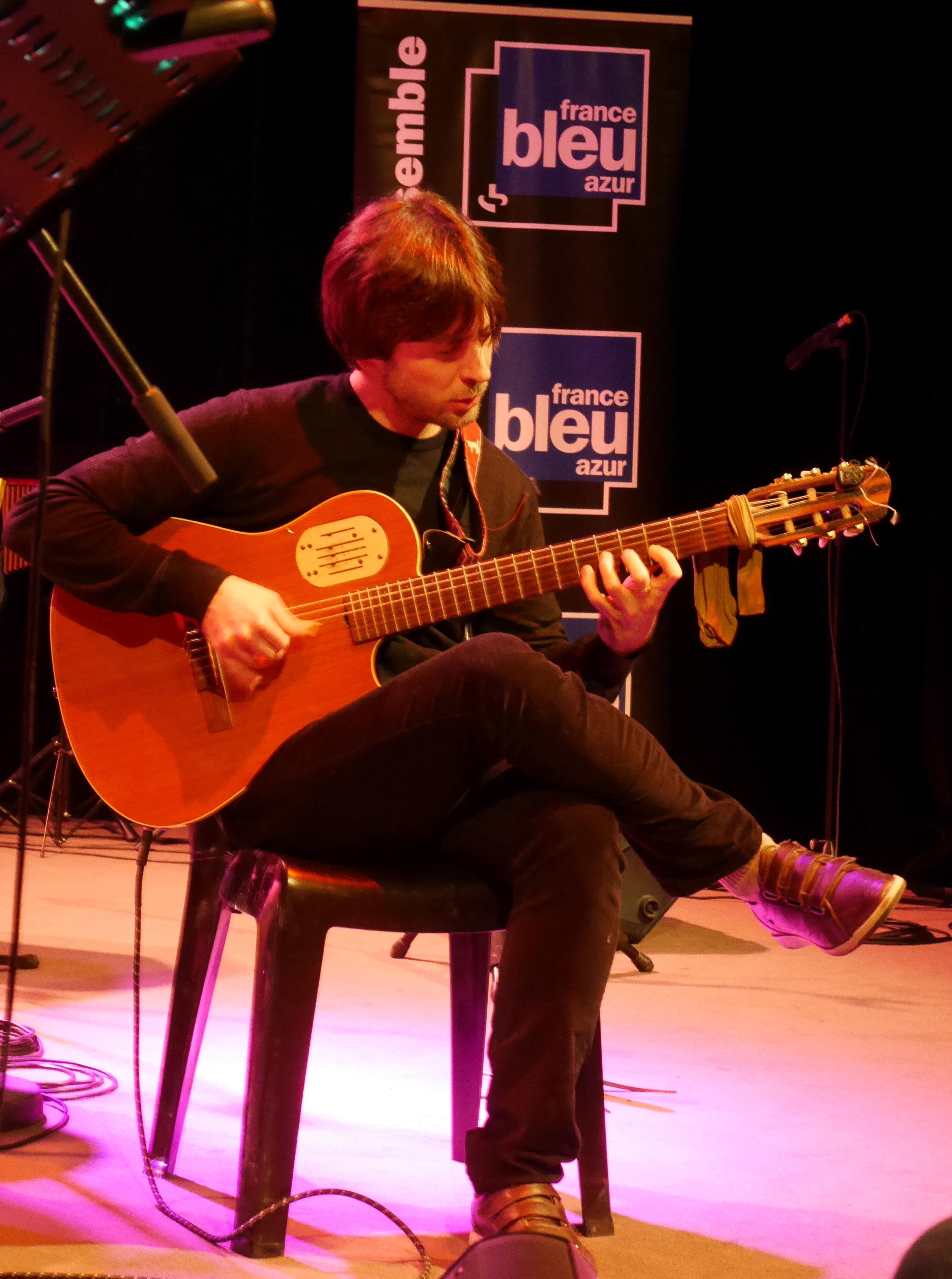 Nelson Veras, Jazz sous les bigaradiers, La Gaude 2015